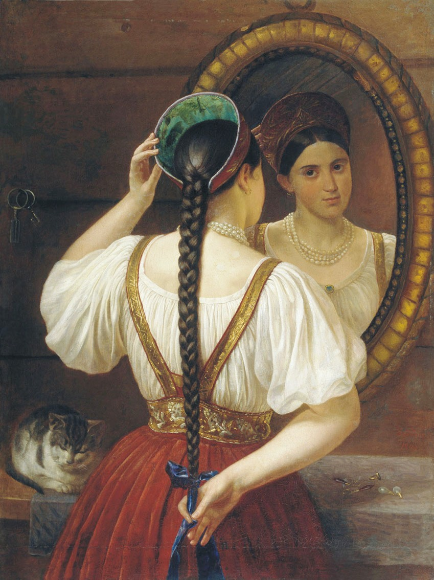 Будкин Филипп Осипович «Девушка перед зеркалом» 1848